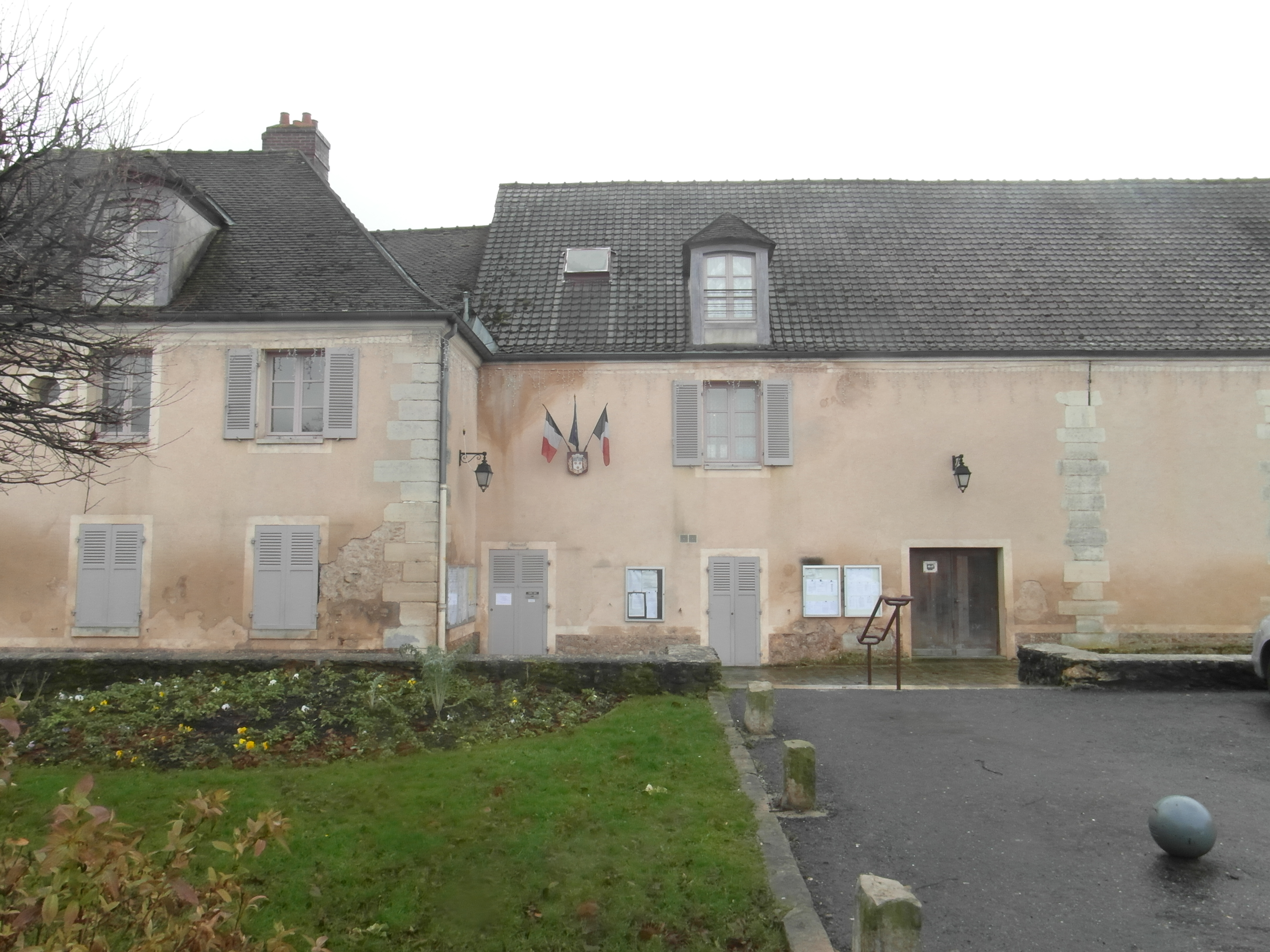 Mairie de Mandres-les-Roses (Val-de-Marne)